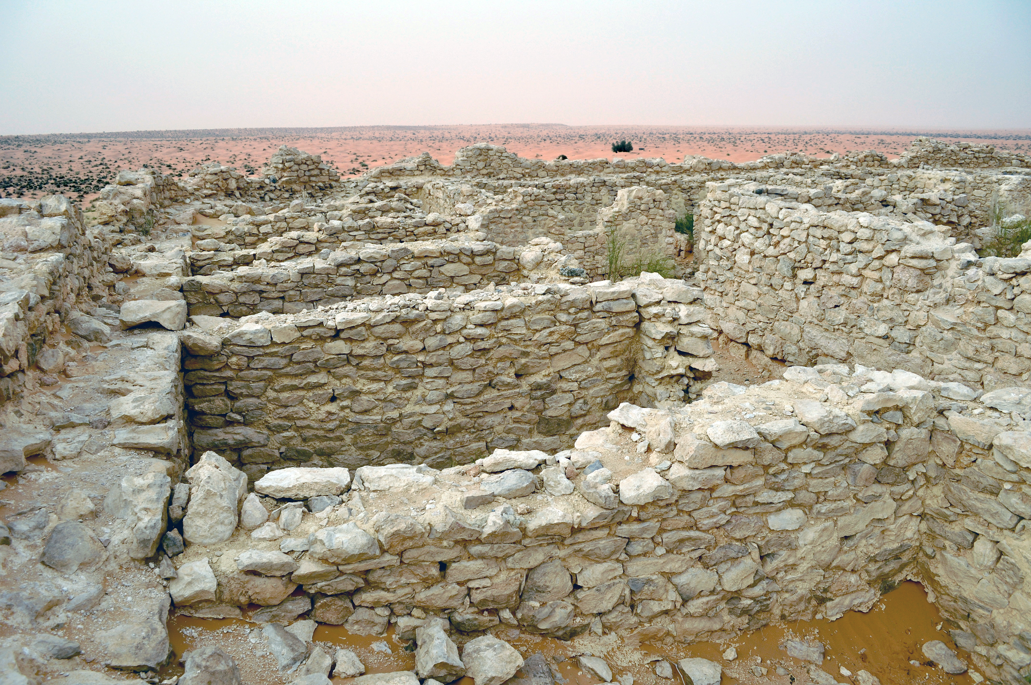 Kleinkastell Tisavar: Rückwärtiger Kastellbereich. Blick vom Wehrgang über die rückwärtigen Räume nach Westen. Rechts die Westwand des Stabsgebäudes.